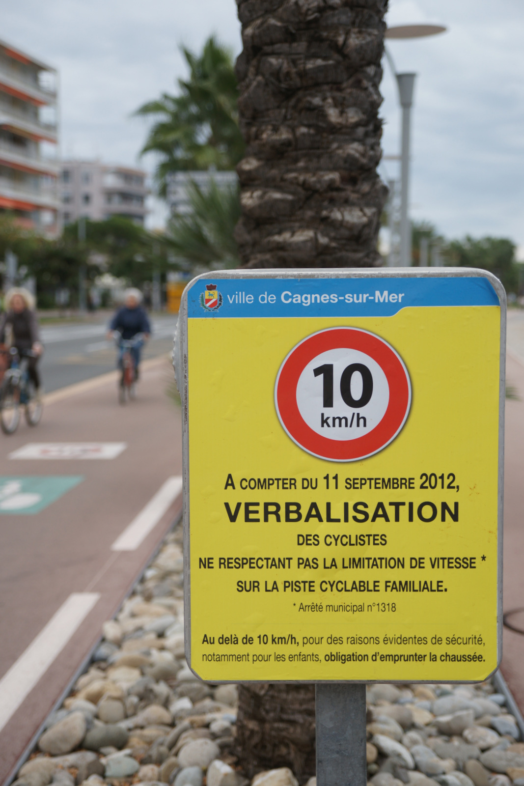 panneau sur la vitesse limitée des vélos à Cagnes-sur-Mer en 2012